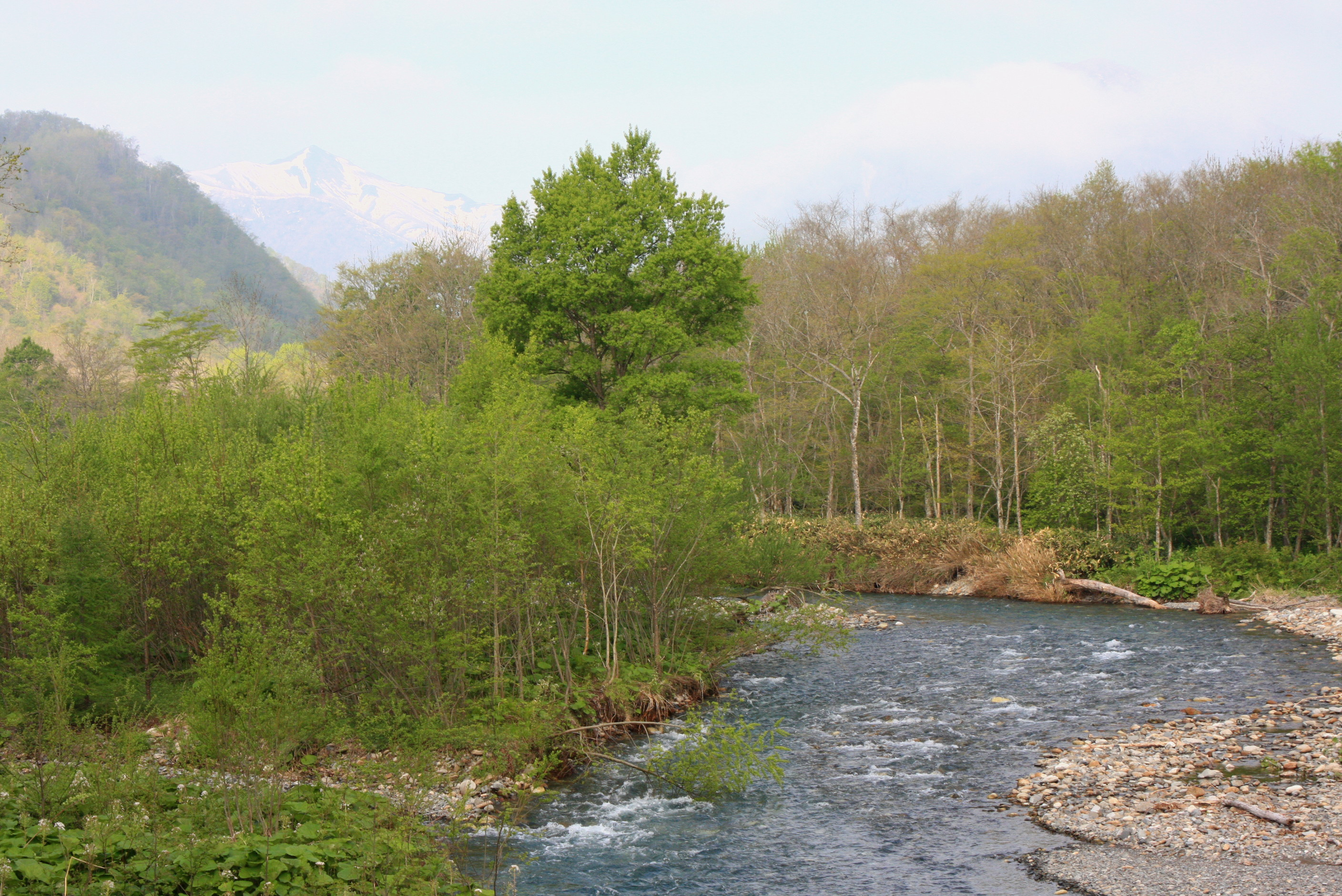 札楽古橋から上流の札楽古川と楽古岳